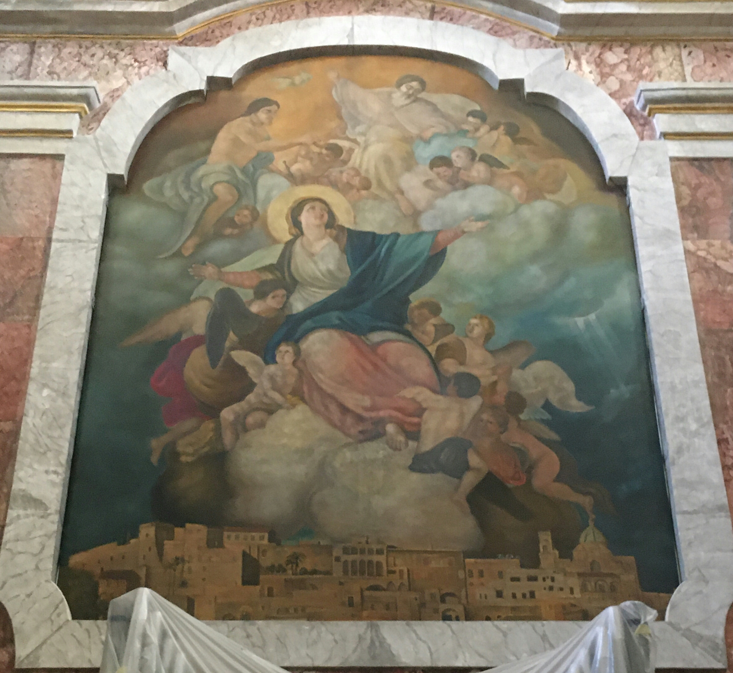 Dipinto dell'"Assunzione della Beata Vergine al Cielo", di Salvatore Toretti, posto sull'altare della cattedrale di Oria.